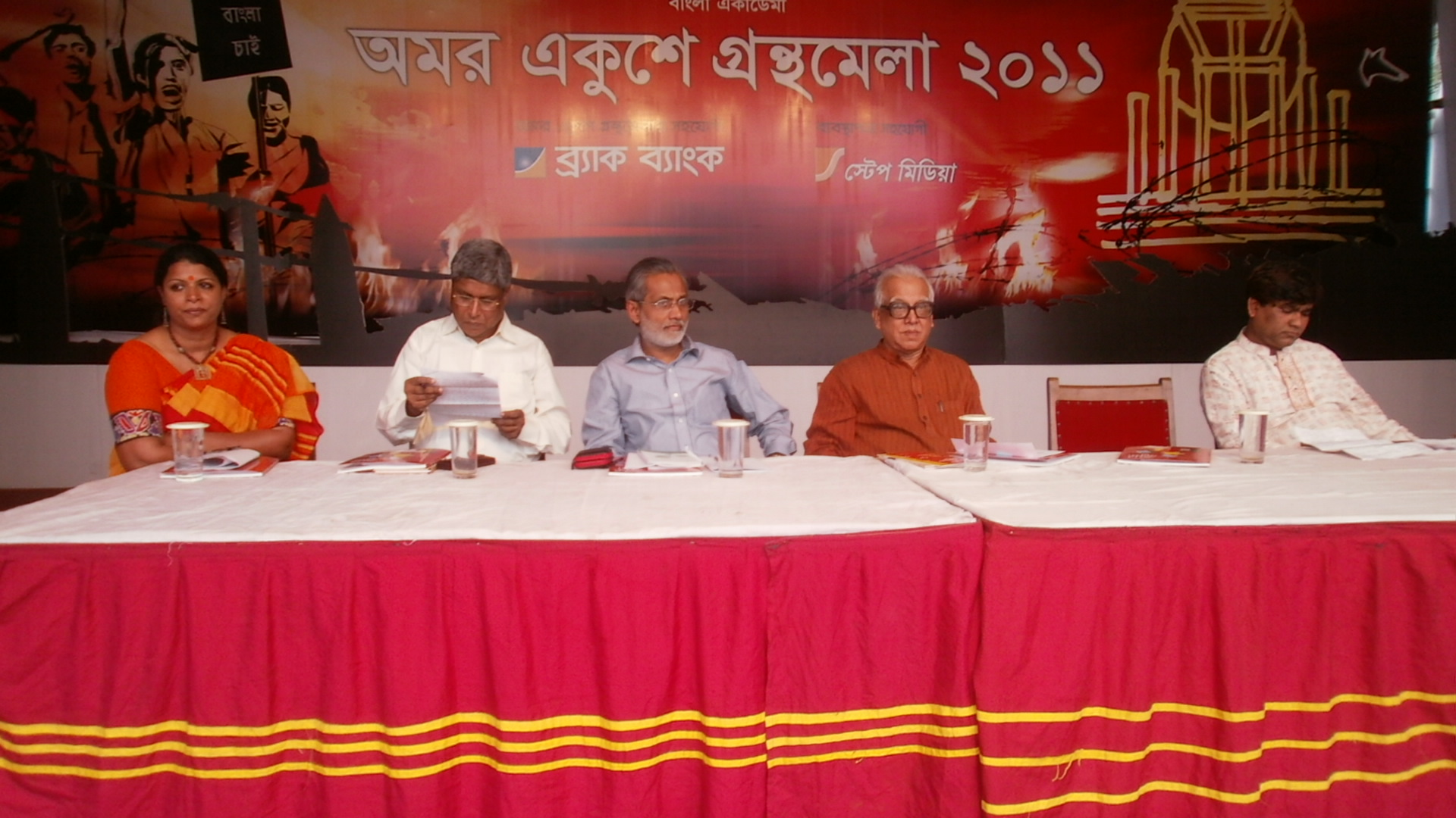 ২০১১ খ্রি বইমেলায় একটি সেমিনারে পুরোহিত পবিত্র সরকার ও আলোচকবৃন্দ